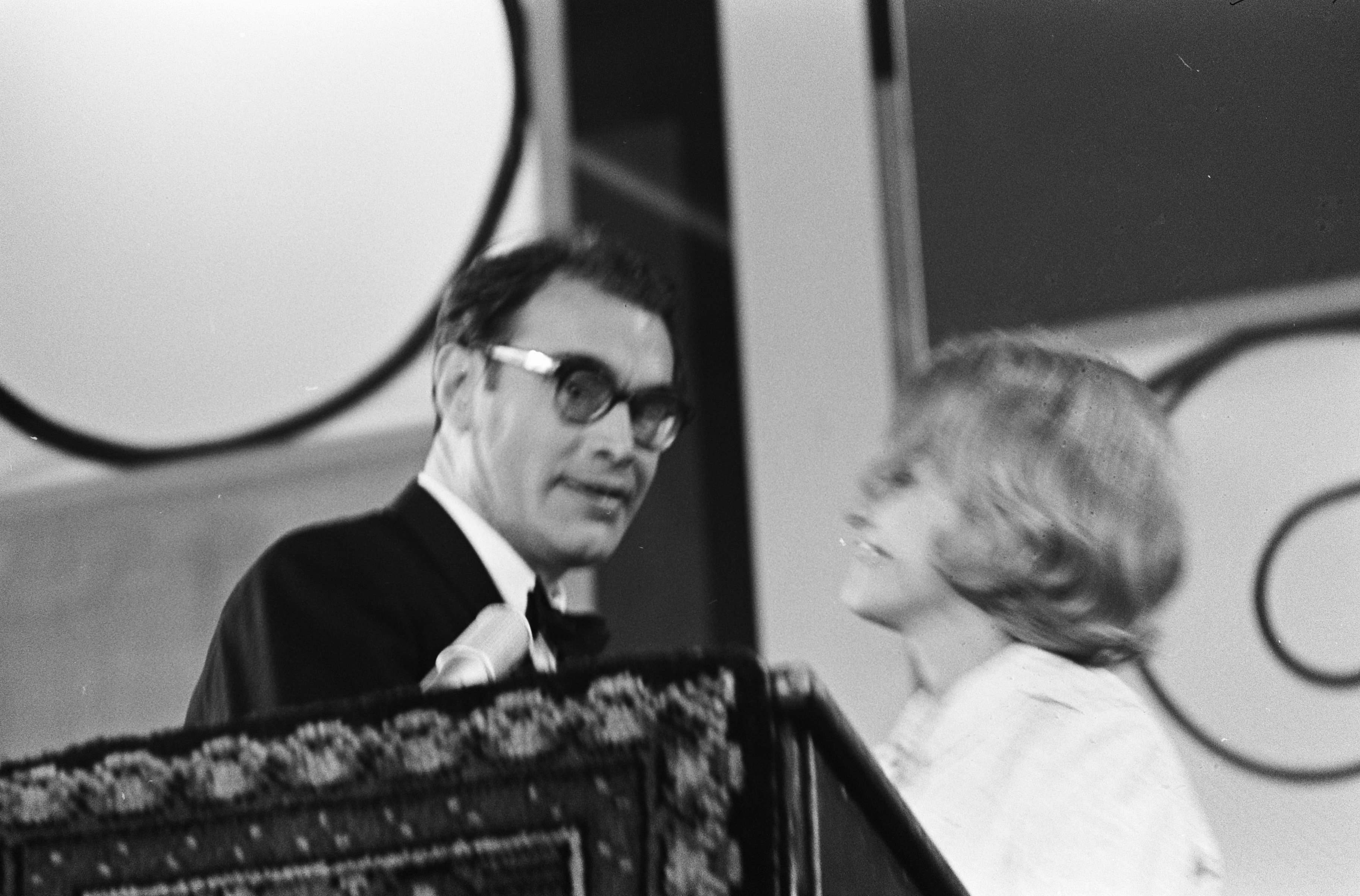 Collectie / Archief : Fotocollectie Anefo Reportage / Serie : [ onbekend ] Beschrijving : Grand Gala du Disque populier in Kurhaus te Scheveningen Marlene Dietrich Datum : 12 oktober 1963 Locatie : Scheveningen, Zuid-Holland Persoonsnaam : Dietrich, Marlene Fotograaf : Koch, Eric / Anefo Auteursrechthebbende : Nationaal Archief Materiaalsoort : Negatief (zwart/wit) Nummer archiefinventaris : bekijk toegang 2.24.01.05 Bestanddeelnummer : 915-6263